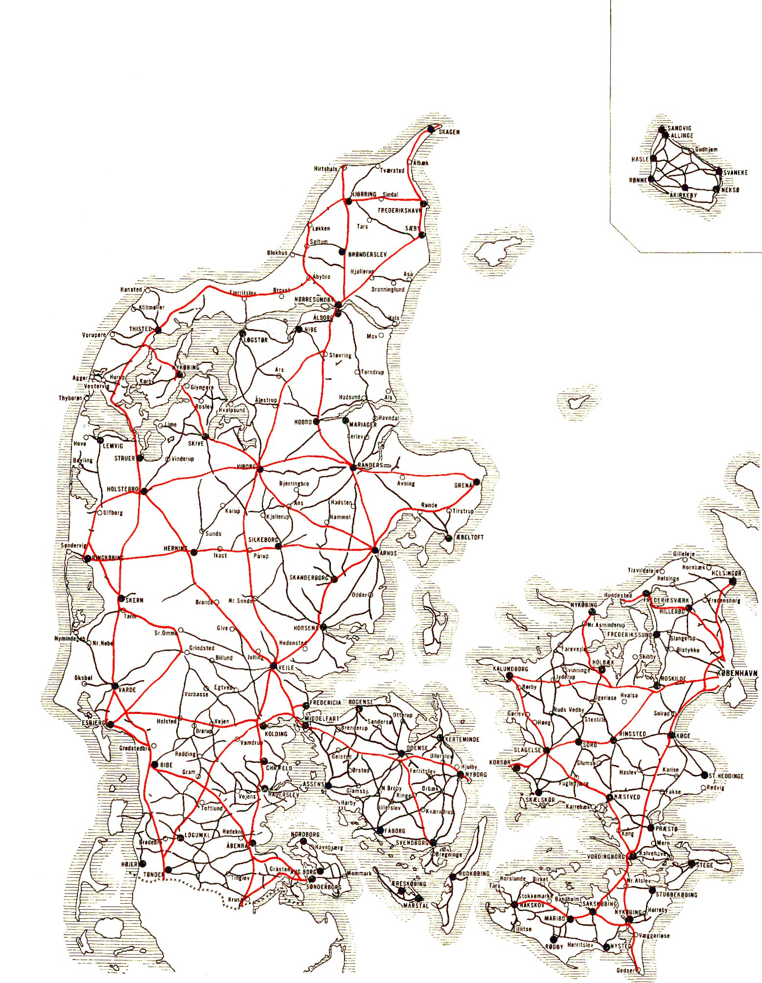 Kort over Danmarks hovedlandeveje anno 1960